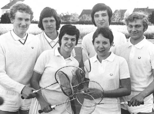 1. BC Beuel, Deutscher Jugend Mannschaftsmeister 1971